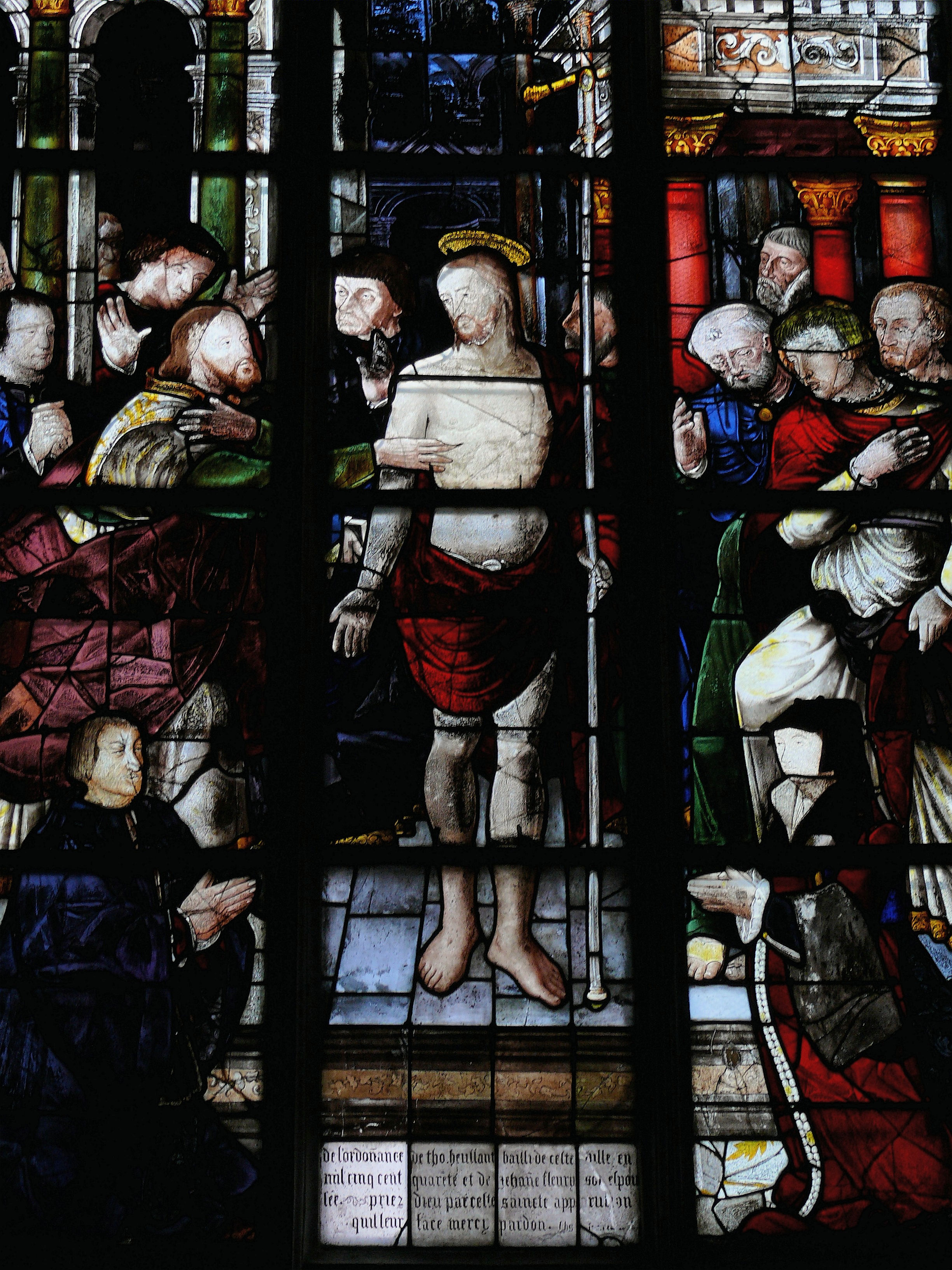 La Ferté-Bernard - Eglise Notre-Dame-des-Marais - Verrière de l'Incrédulité de Saint-Thomas, commandée en 1540 par Thomas Heullant, bailli de la ville